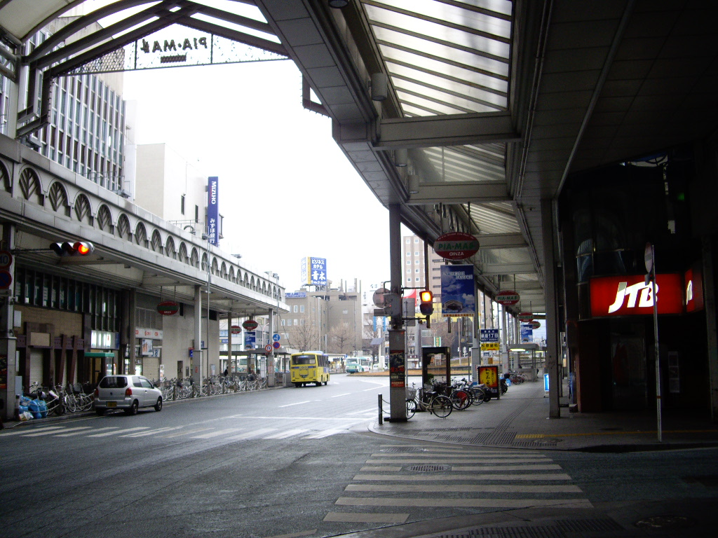 銀座通り商店街（周南市）